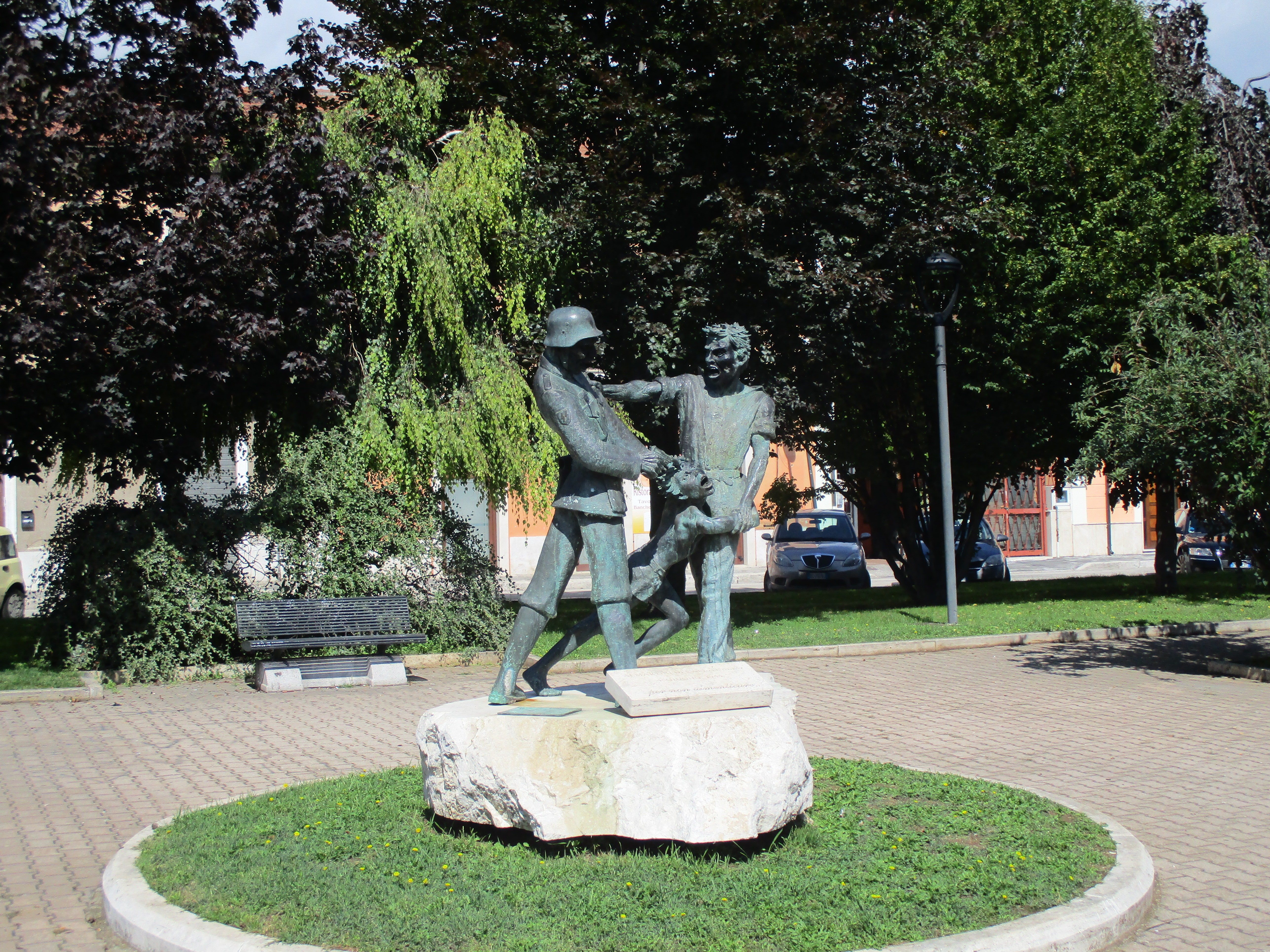 Monumento bronzeo ai 33 Martiri di Capistrello in piazza Bruno Corbi ad Avezzano (opera di Giuseppe Palombo)